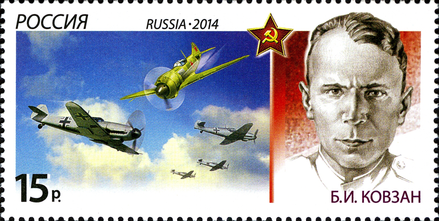 История авиации. Воздушные тараны; Борис Иванович Ковзан